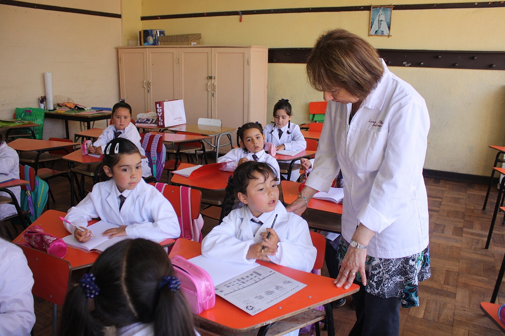 Normal regreso a clases de estudiantes choreros